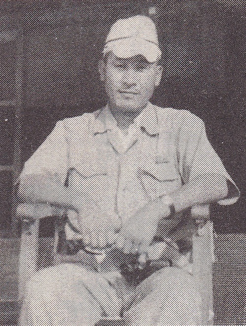 猪口力平海軍大佐